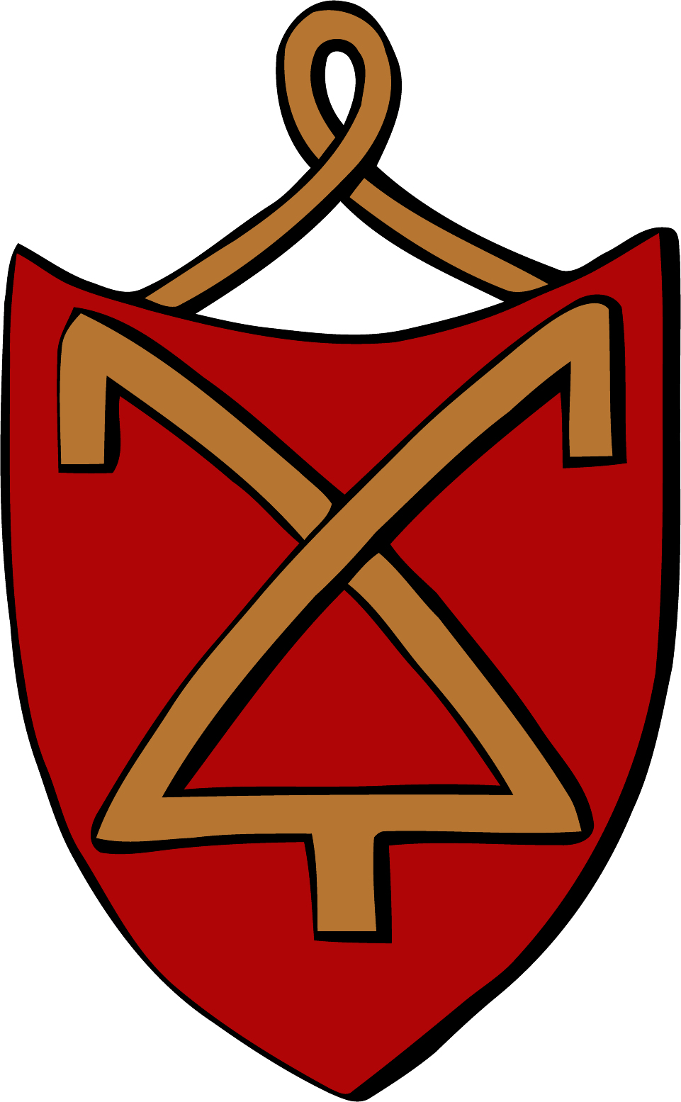 Грб српске династије Санковић.